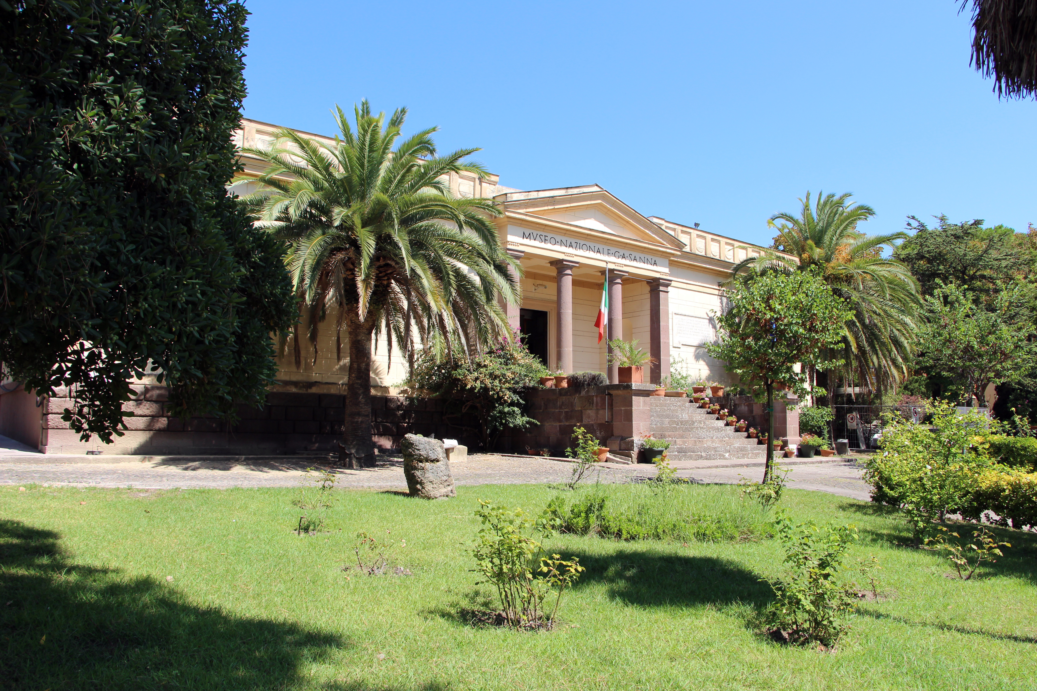 Museo archeologico nazionale G.A. Sanna - MIBAC The making of this document was supported by Wikimedia CH. (Submit your project!) For all the files concerned, please see the category Supported by Wikimedia CH. This is a photo of a monument which is part of cultural heritage of Italy.